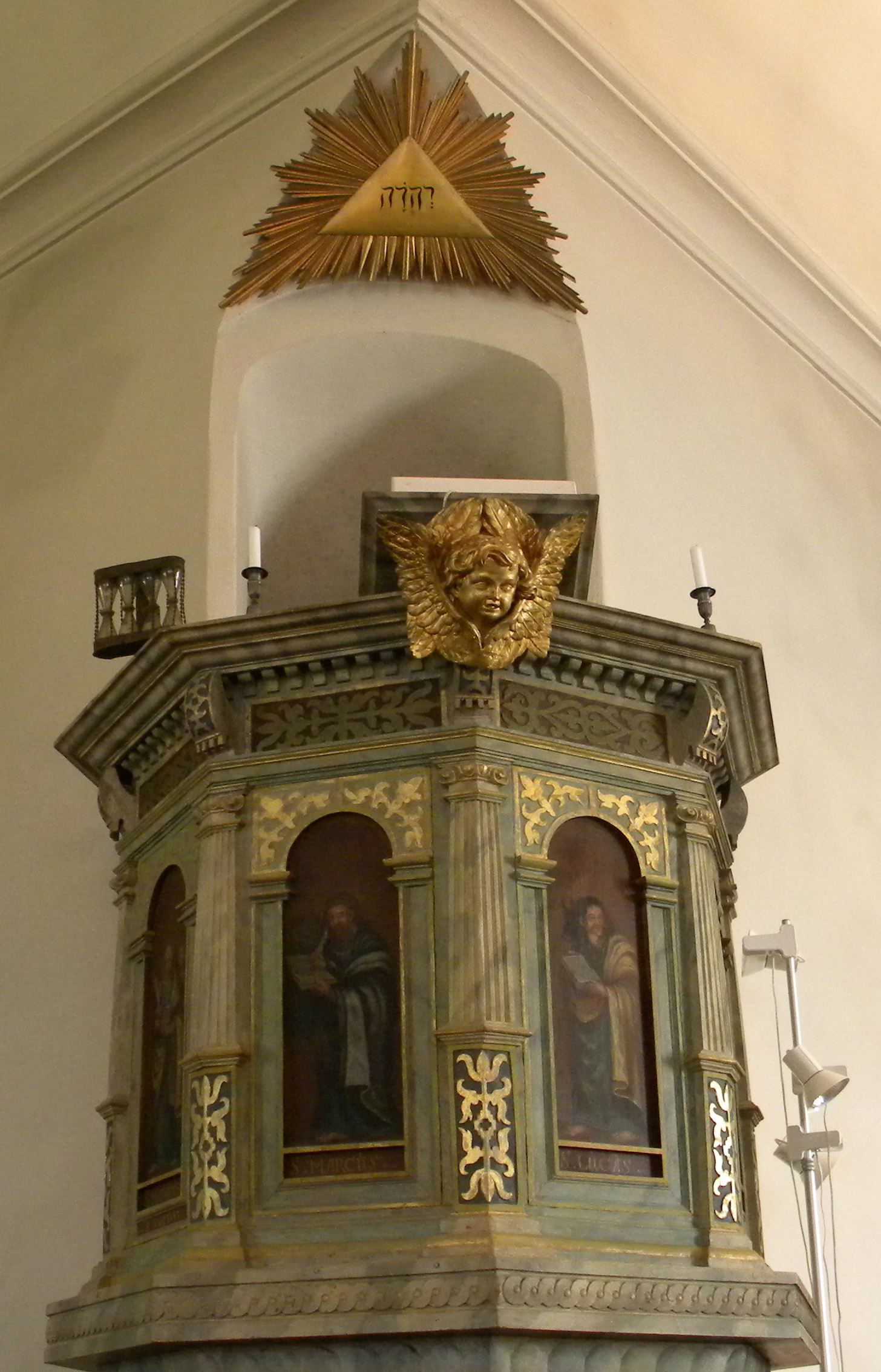 Predikstolen i Barva kyrka